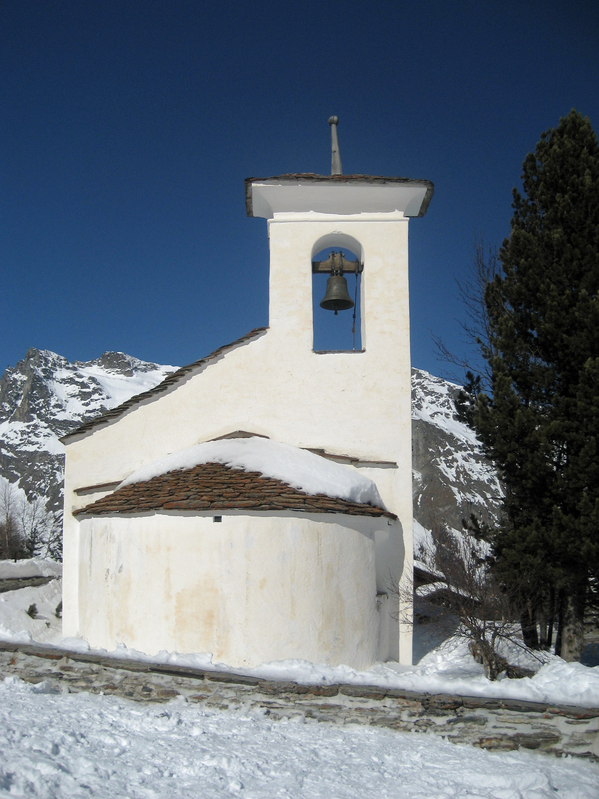 Kirche im Fex